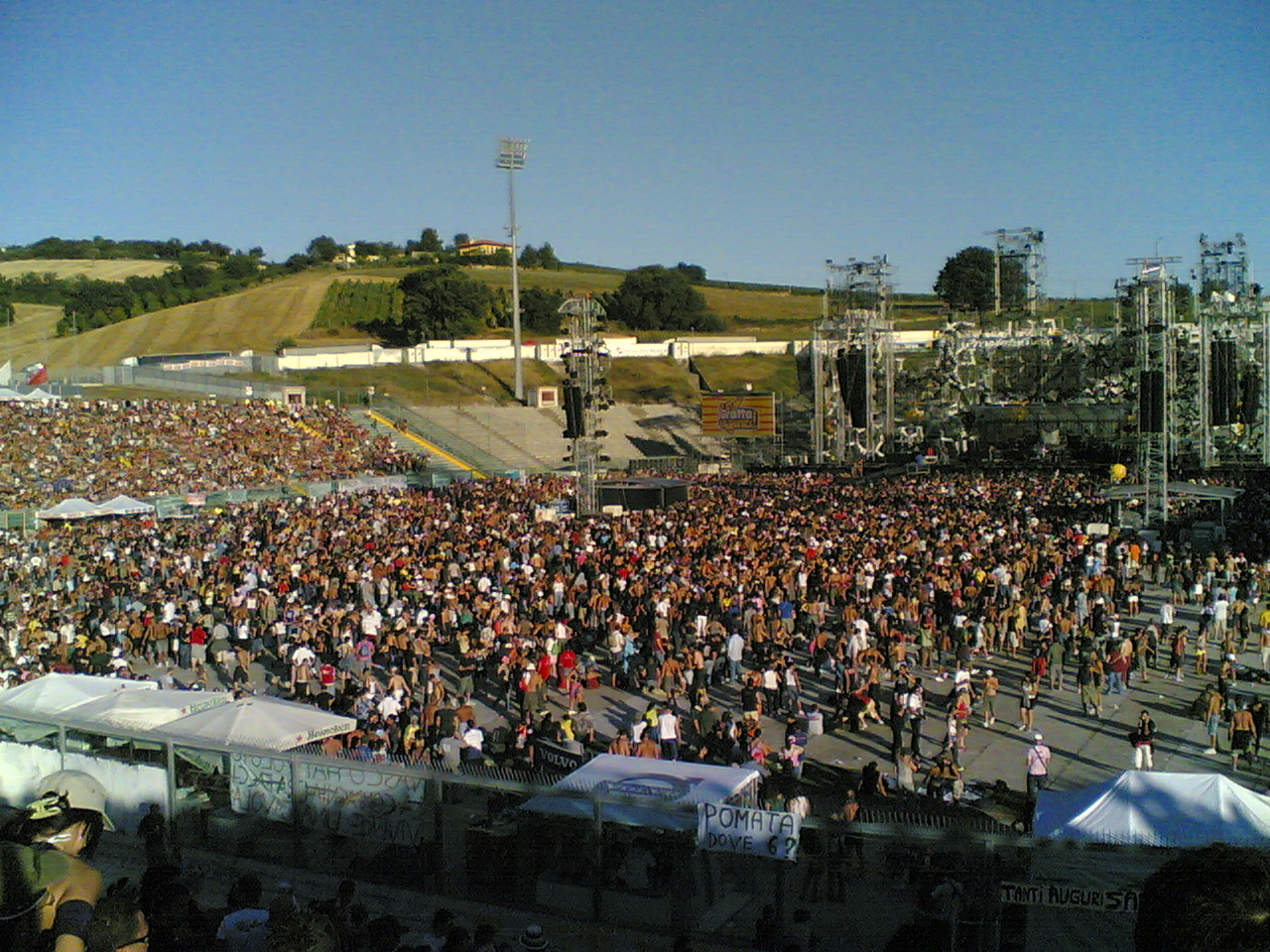 Concerto di Vasco Rossi allo stadio "Del Conero" di Ancona.